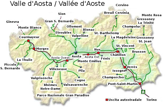 Mappa della Valle d'Aosta